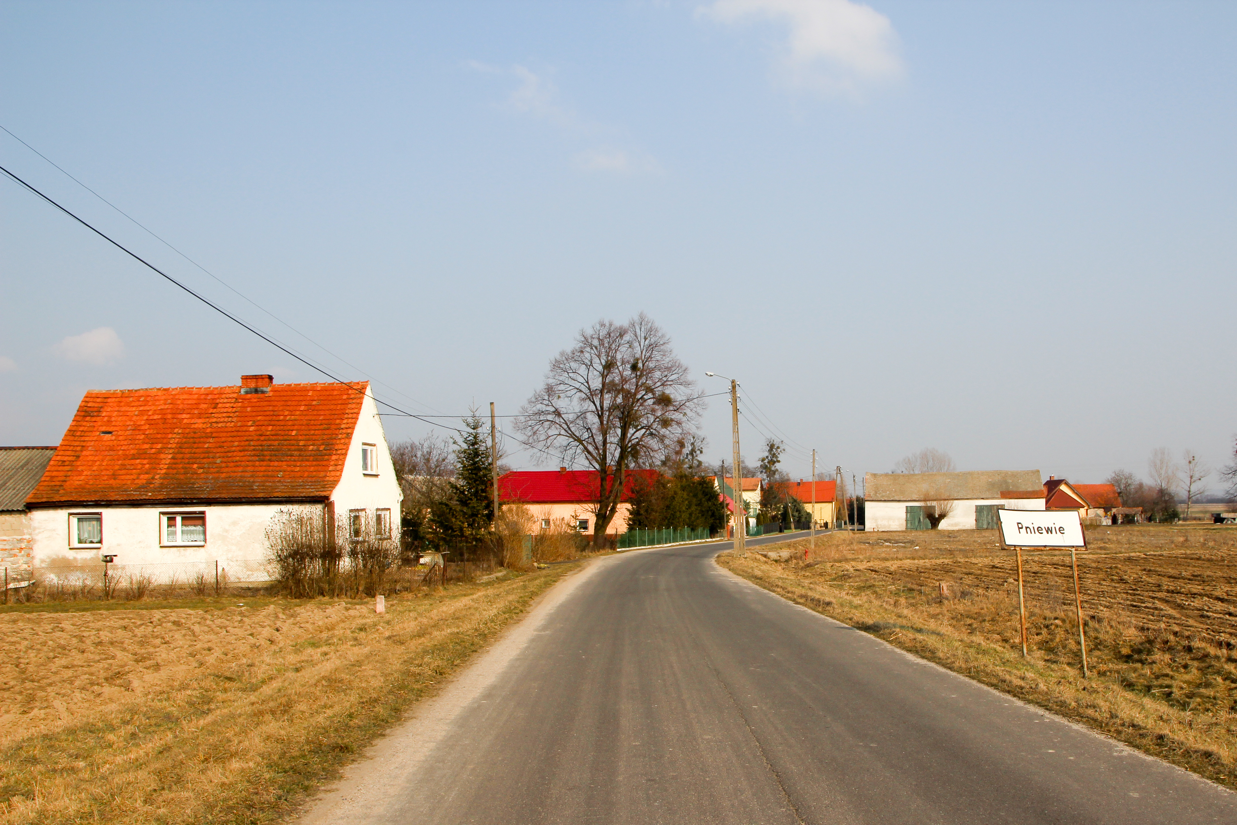 Pniewie – wieś w Polsce, w województwie opolskim, w powiecie nyskim, w gminie Skoroszyce.